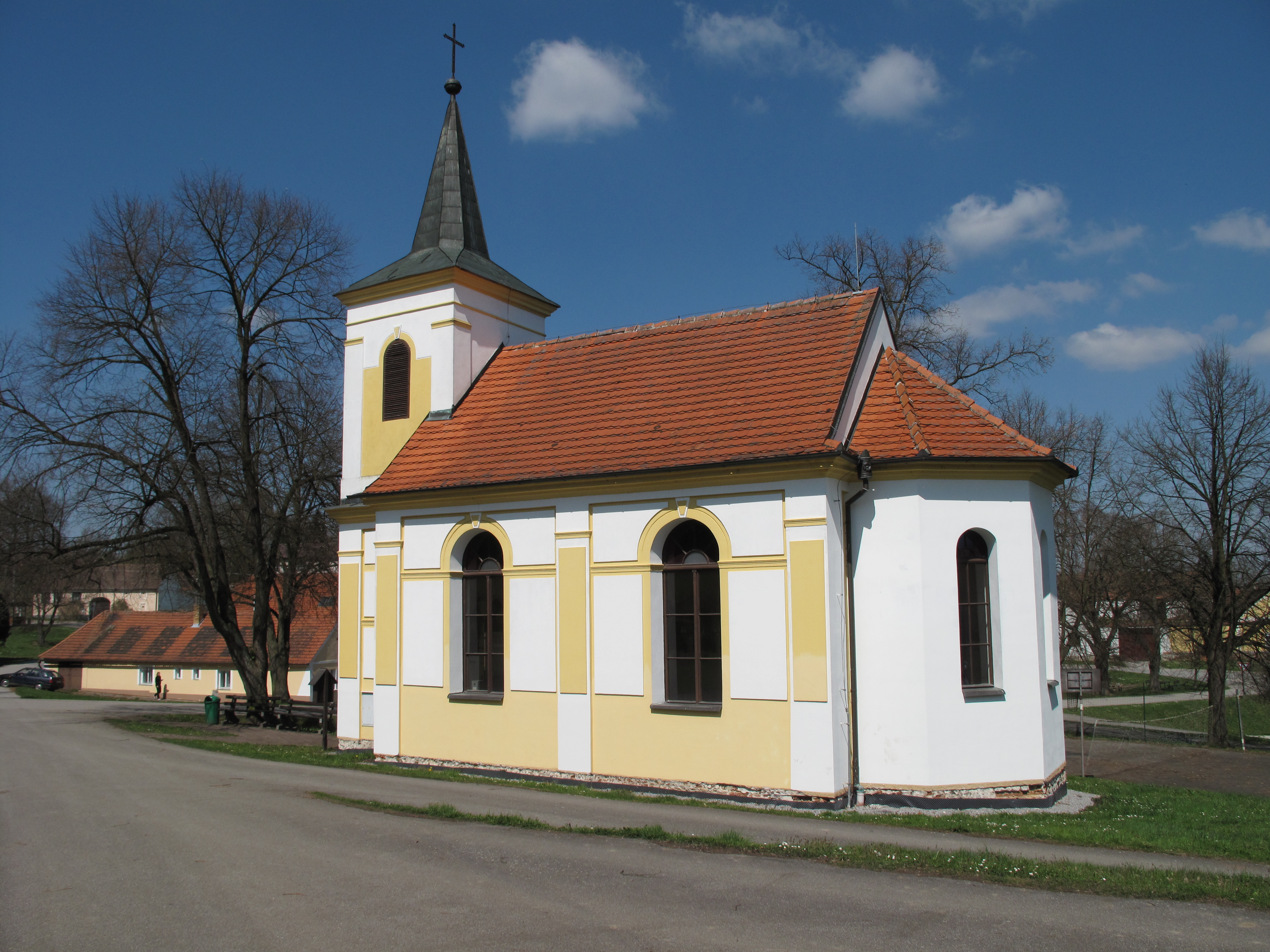 Kostel v Hartmanicích. Okres České Budějovice, Česká republika.